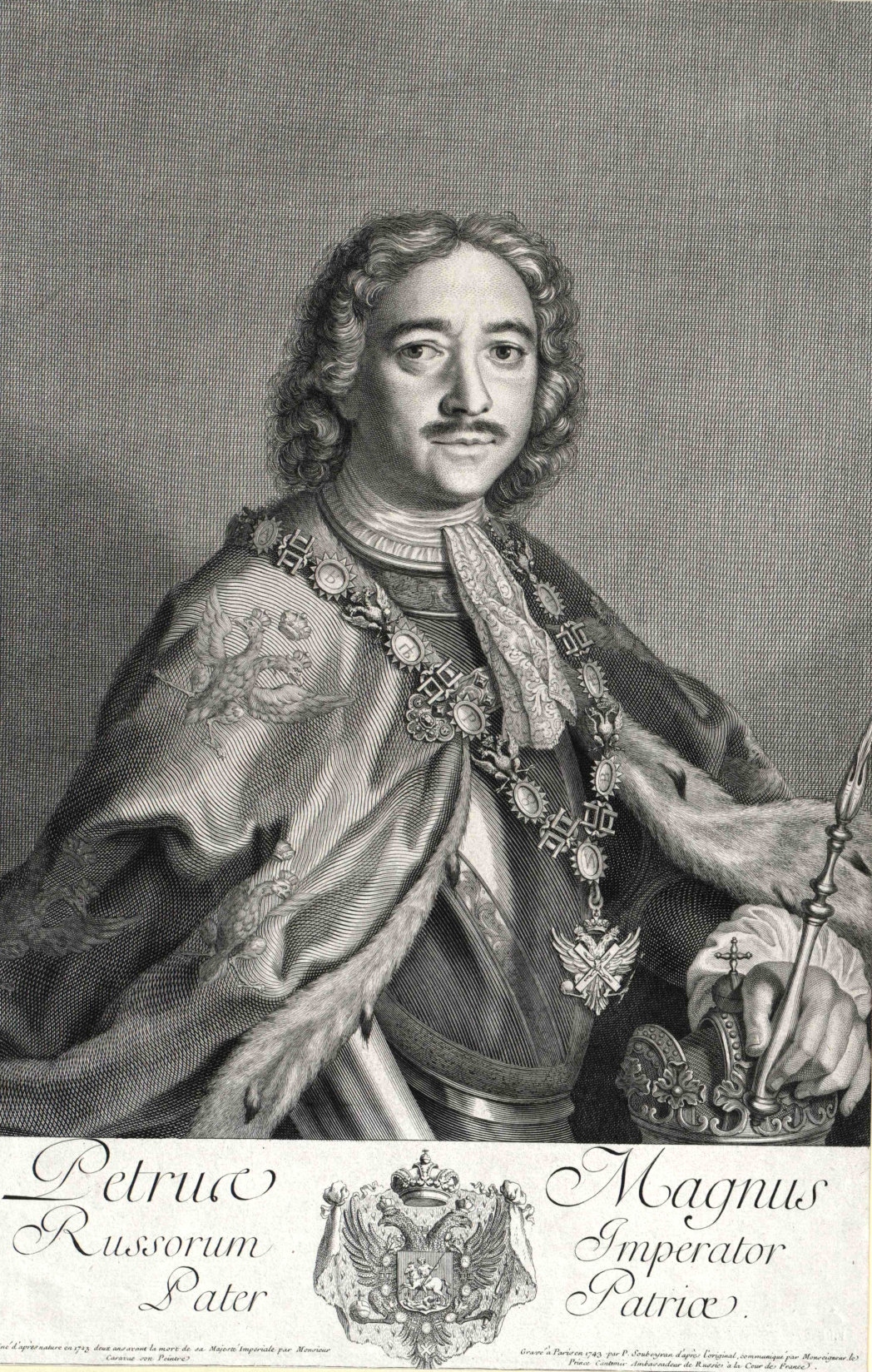 Peter I. der Große, Kaiser von Russland